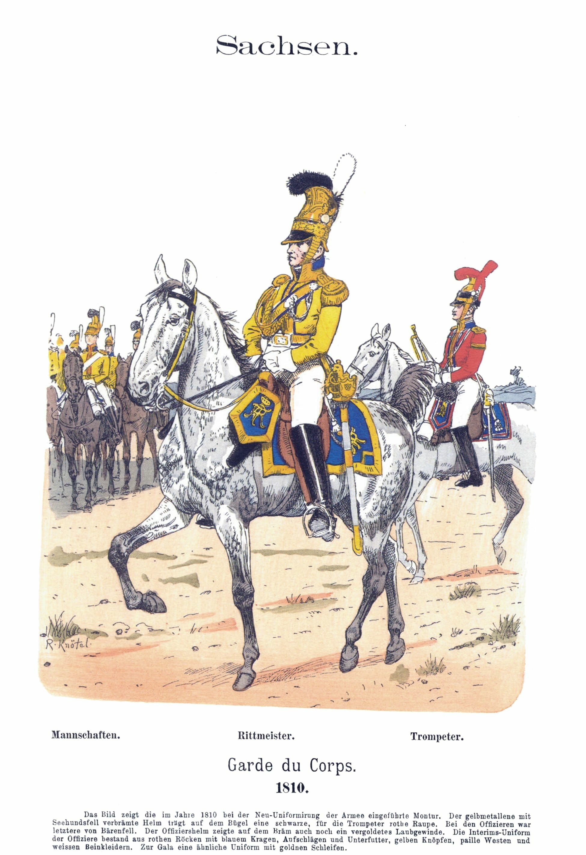 Иллюстрация Рихарда Кнотеля